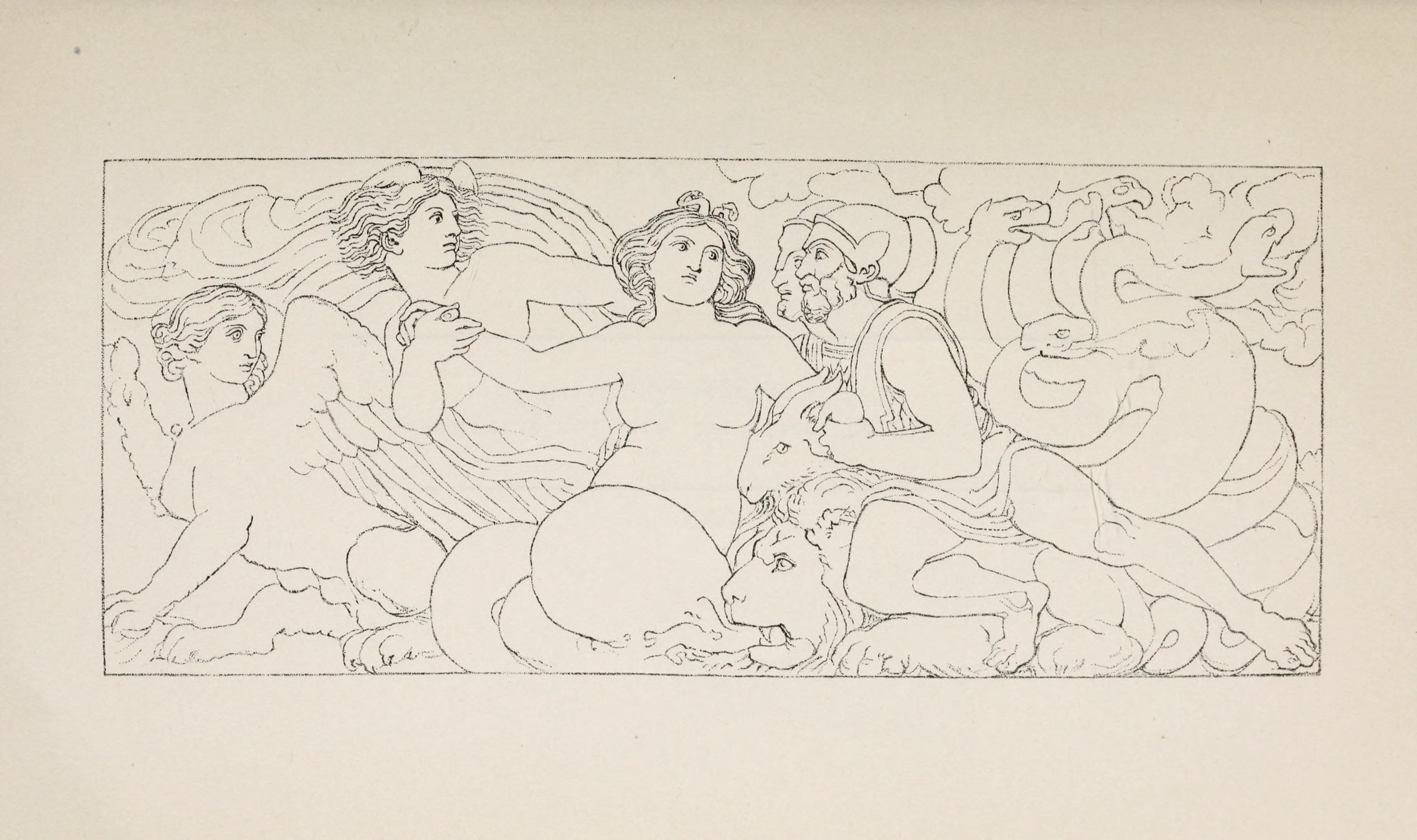 Die Ungeheuer der Theogonie (v. l. n. r. die Sphinx, Typhaon, Echidna, Chimaira, Geryones und die Hydra von Lerna). – Hesiod, Theogonie V. 304. Schwab, Sagen des klassischen Altertums I. 247f., zu Typhaon 167, 169, 213, 247, zu Echidna 167, 169, 213, 247, zur Chimaira 213, zu Geryones 178f., zur Hydra 169f.